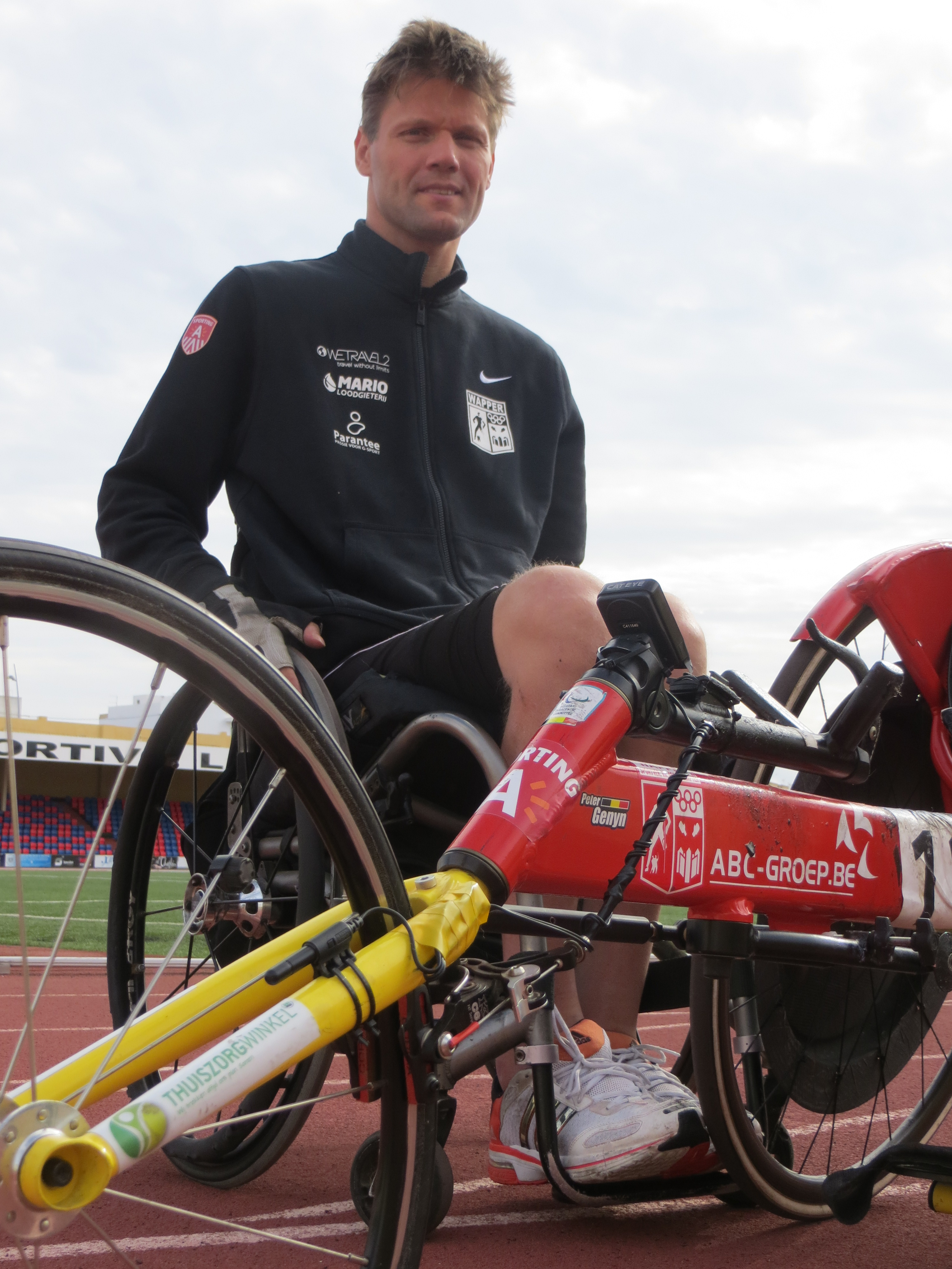 Peter Genyn